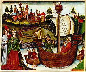 Miniatura del Libro del caballero Zifar, manuscrito_de_Paris